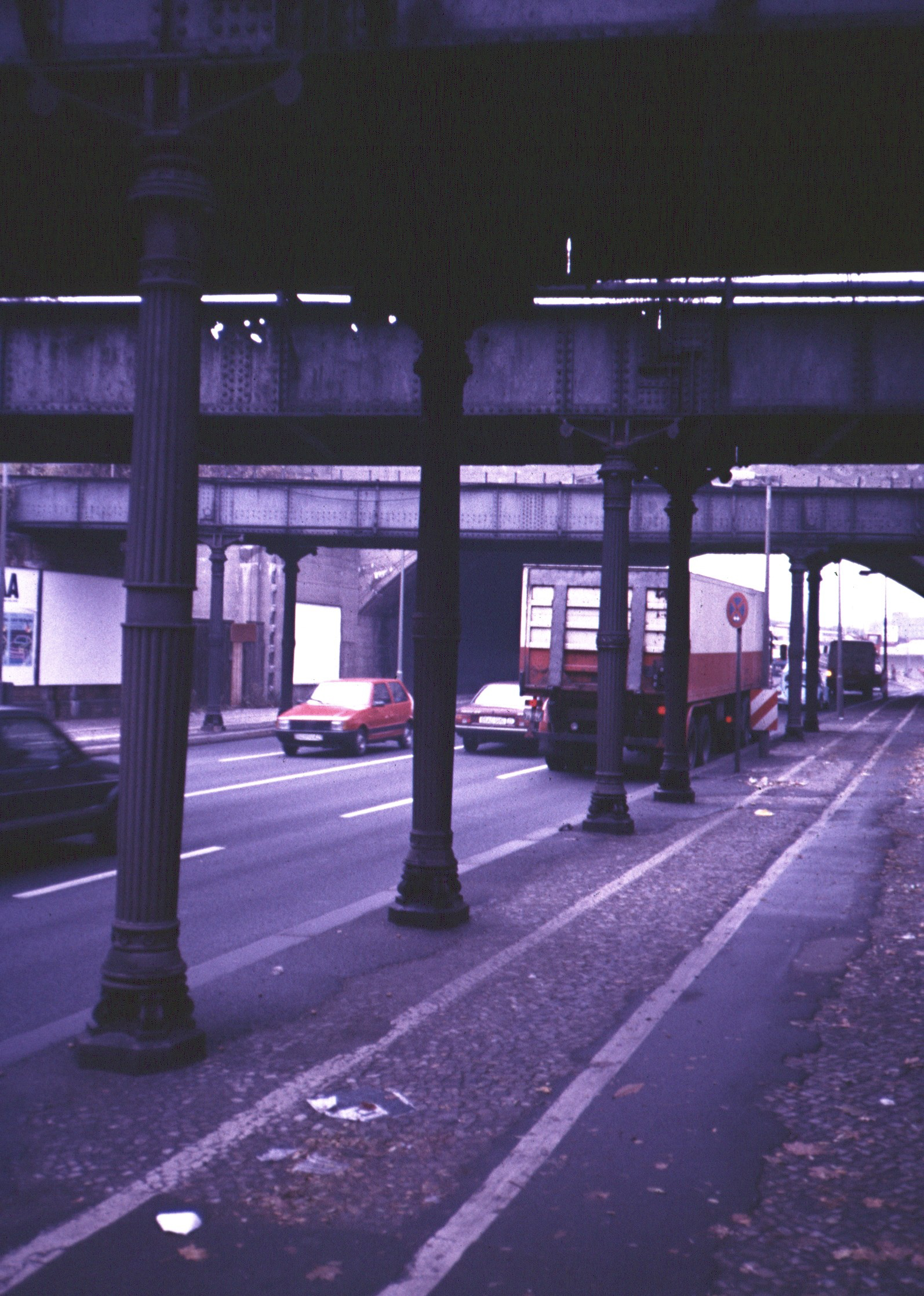 Sachsendamm Berlin